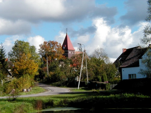 Bierkowo - panorama wsi z rzymskokatolickim kościołem filialnym pw. św. Józefa Ceranowski Piotr 2003.09.09